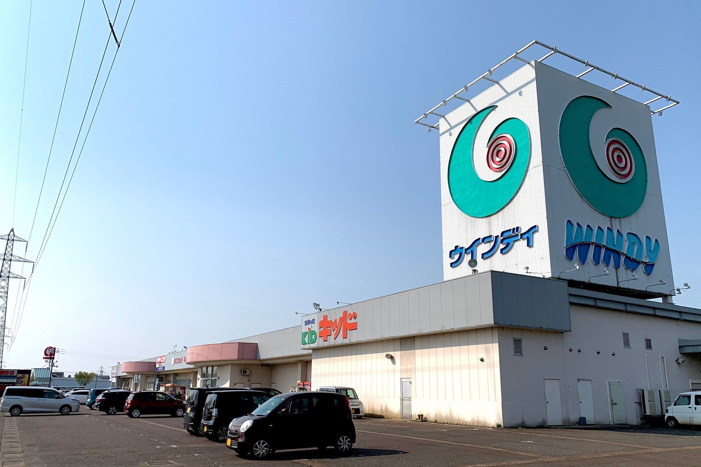 国道49号沿い、安田IC近くのショッピングセンター「ウインディ」（新潟県阿賀野市，2020年5月）